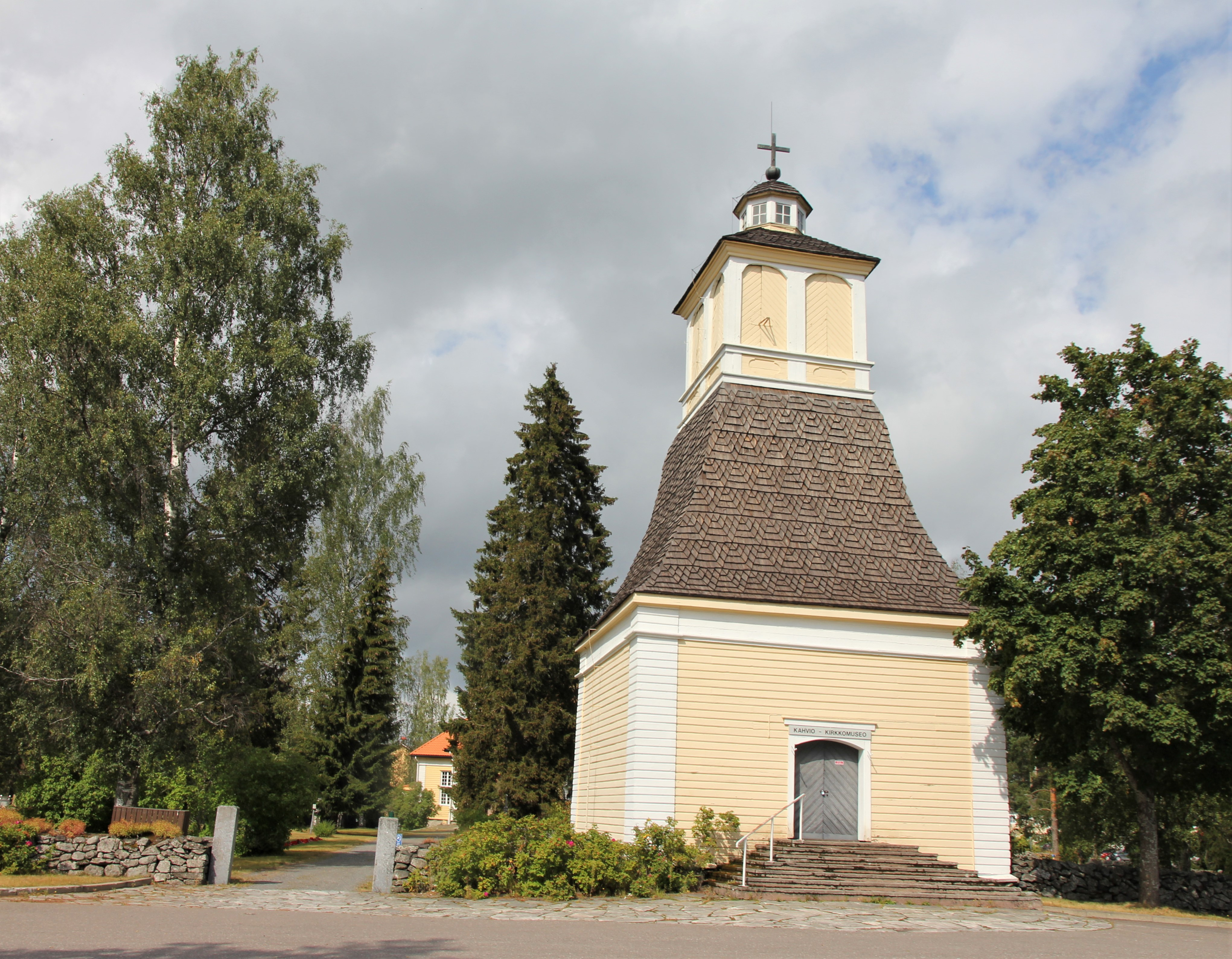 Joroisten kirkon tapuli sijaitsee Joroisten kirkonkylällä, osoitteessa Pieksämäentie 1. Nykyinen kellotapuli on ikäjärjestyksessä kolmas ja vuodelta 1772. Ensimmäinen kellotapuli oli rakennettu (valmistunut) 1640-luvun jälkipuoliskolla ja toinen vuonna 1694. Kellotapulissa on kaksi kelloa; rakennus toimii myös kirkkomuseona, joka on auki kesällä torstai-iltaisin toriaikaan. Kuvattu otettu 13.8.2019.